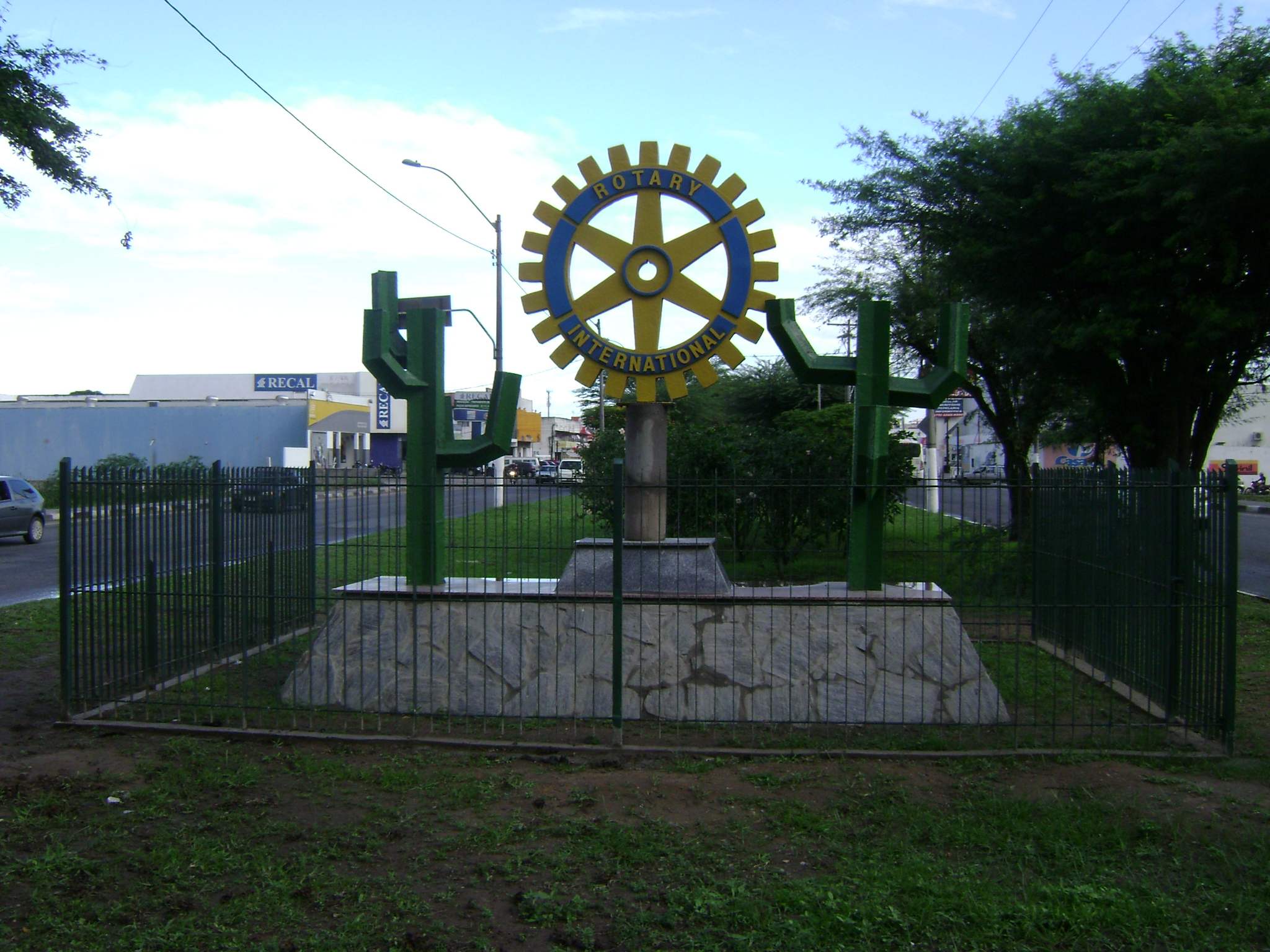 Monumento ao Rotary na Avenida J. J. Seabra, em Feira de Santana, Brasil.